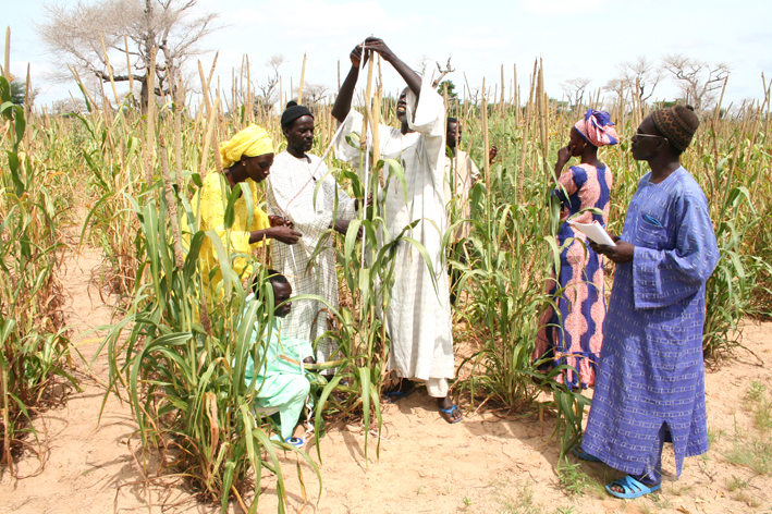 photo d'un champ dans le cadre d'un programme du CORAF